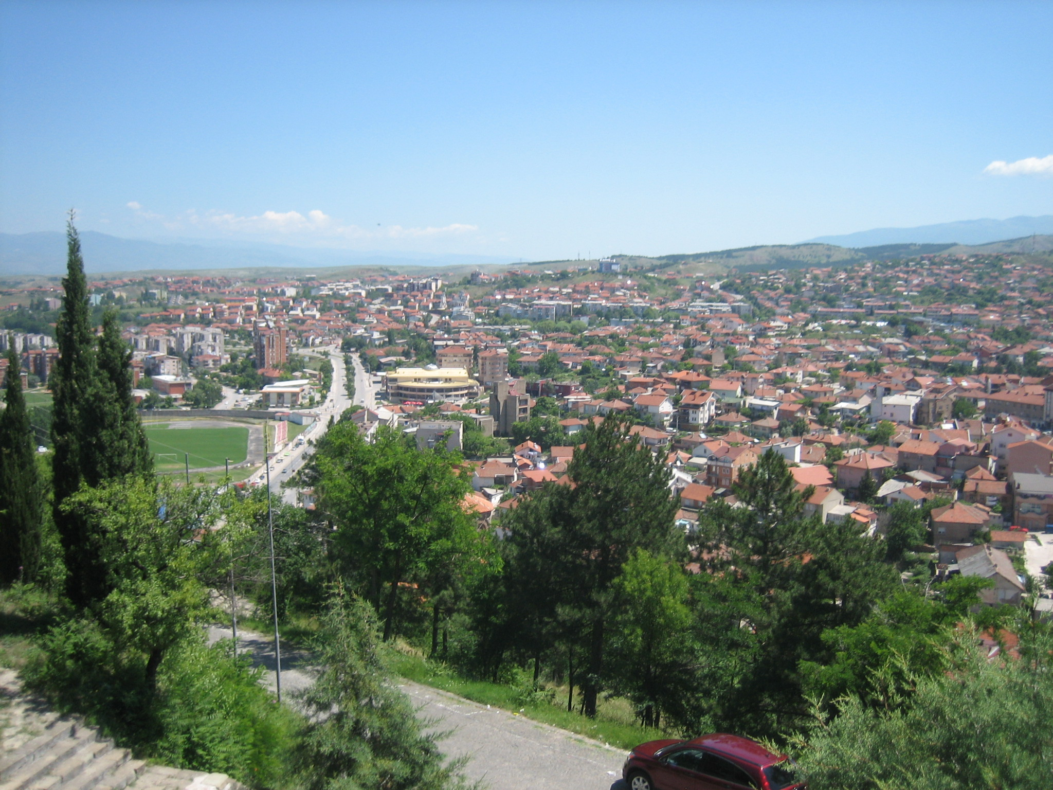 Štip, Macedonia